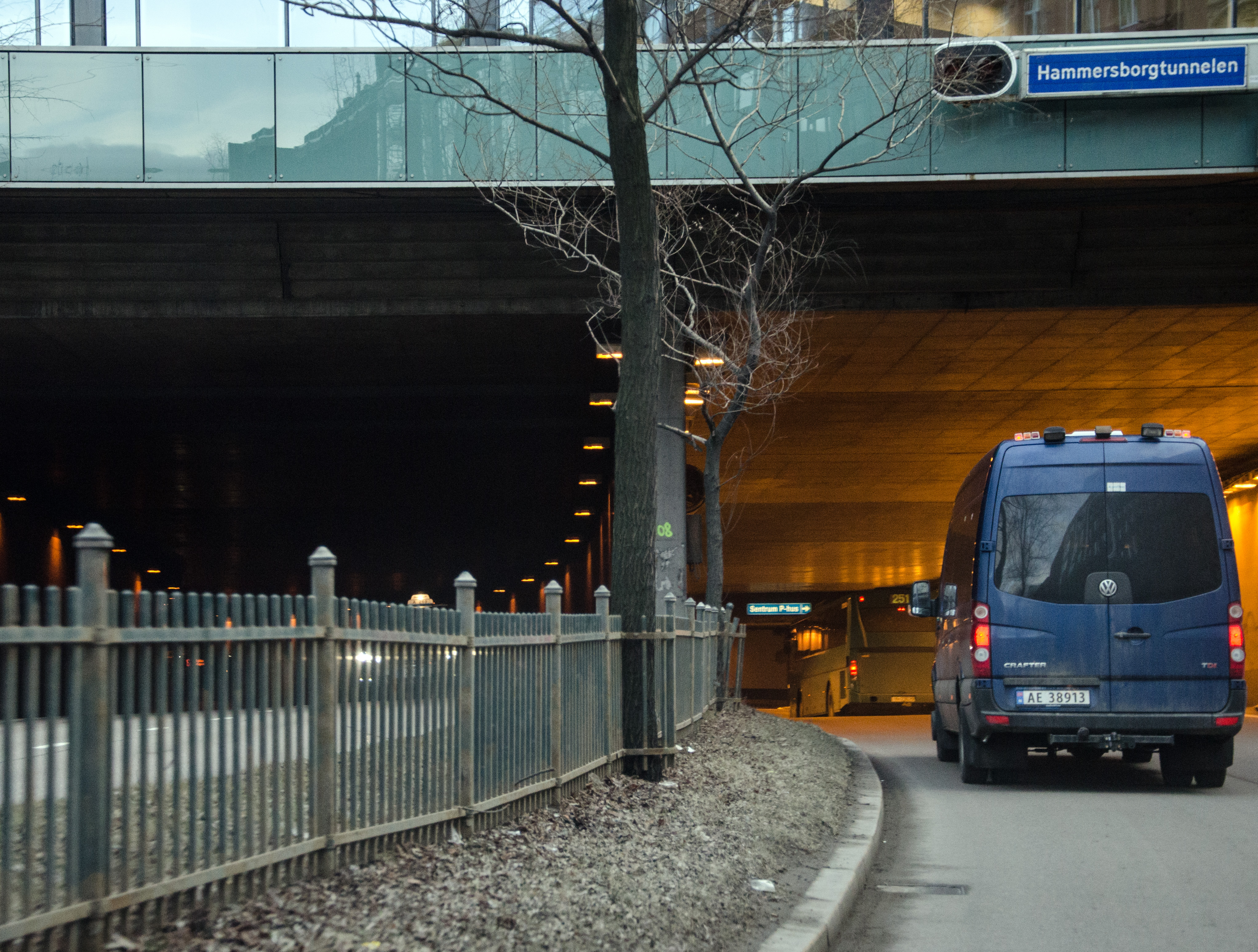 Hammersborgtunnelen